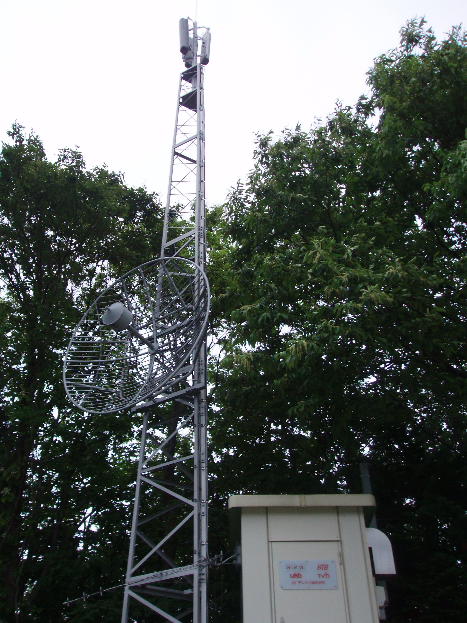 由仁中継局 NHK・HTB・UHB・TVh送信設備